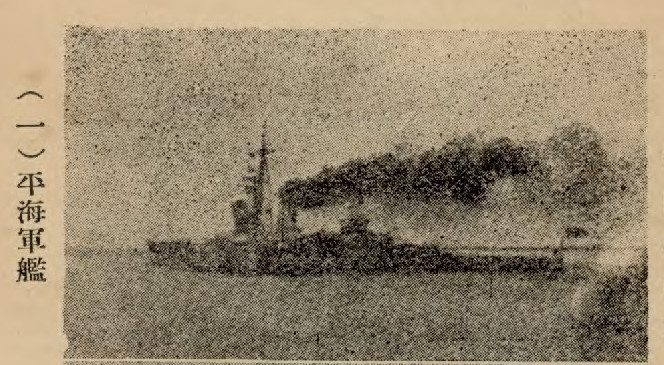 中文（中国大陆）: 中國新海軍插圖